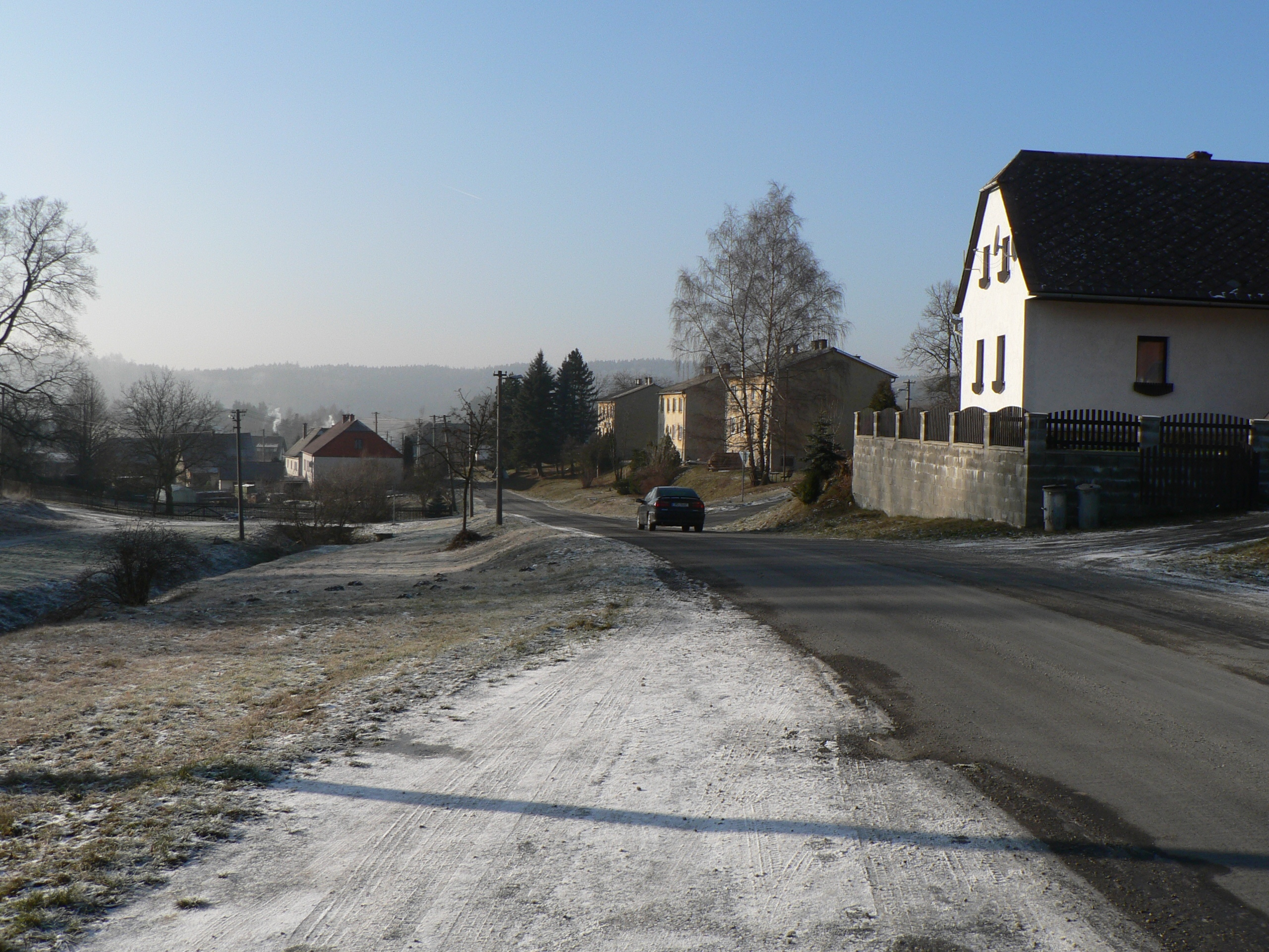 Pohled na obec u kostela